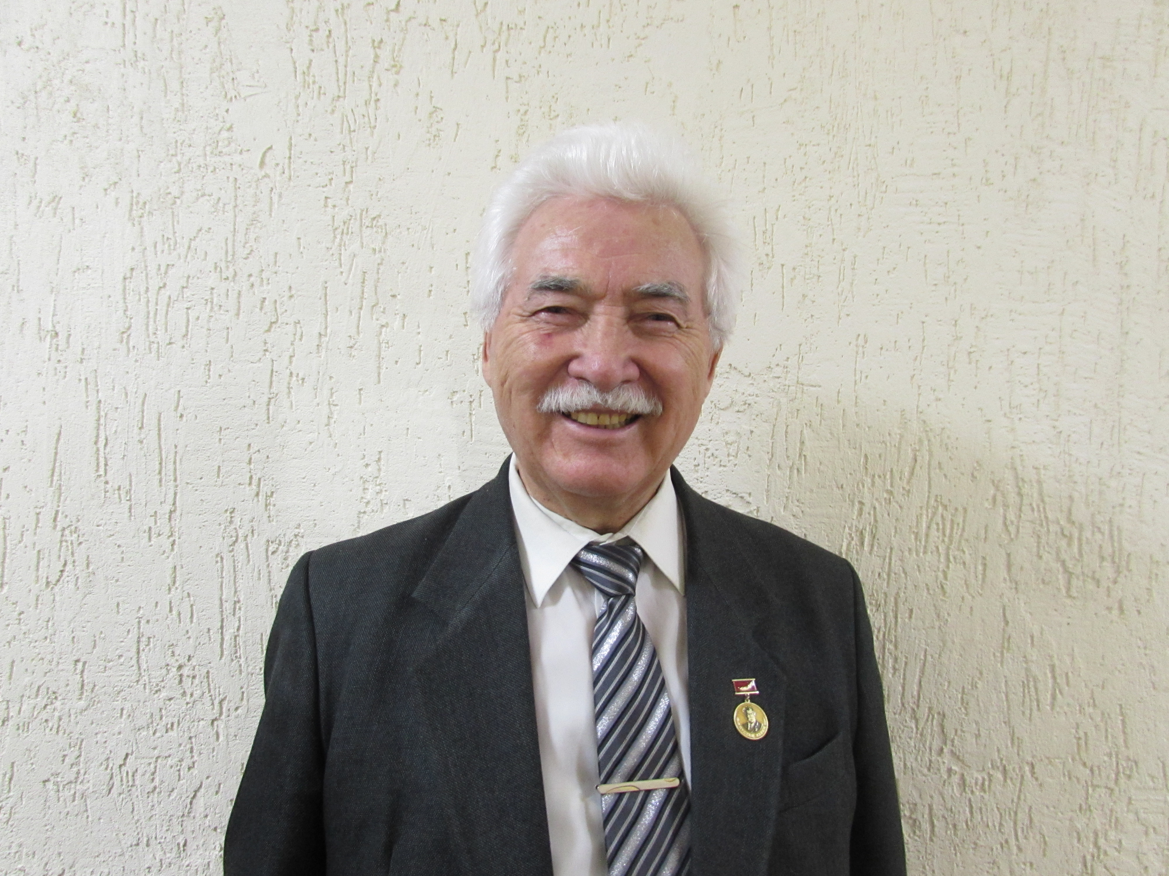 Мастер-класс сэсэнов